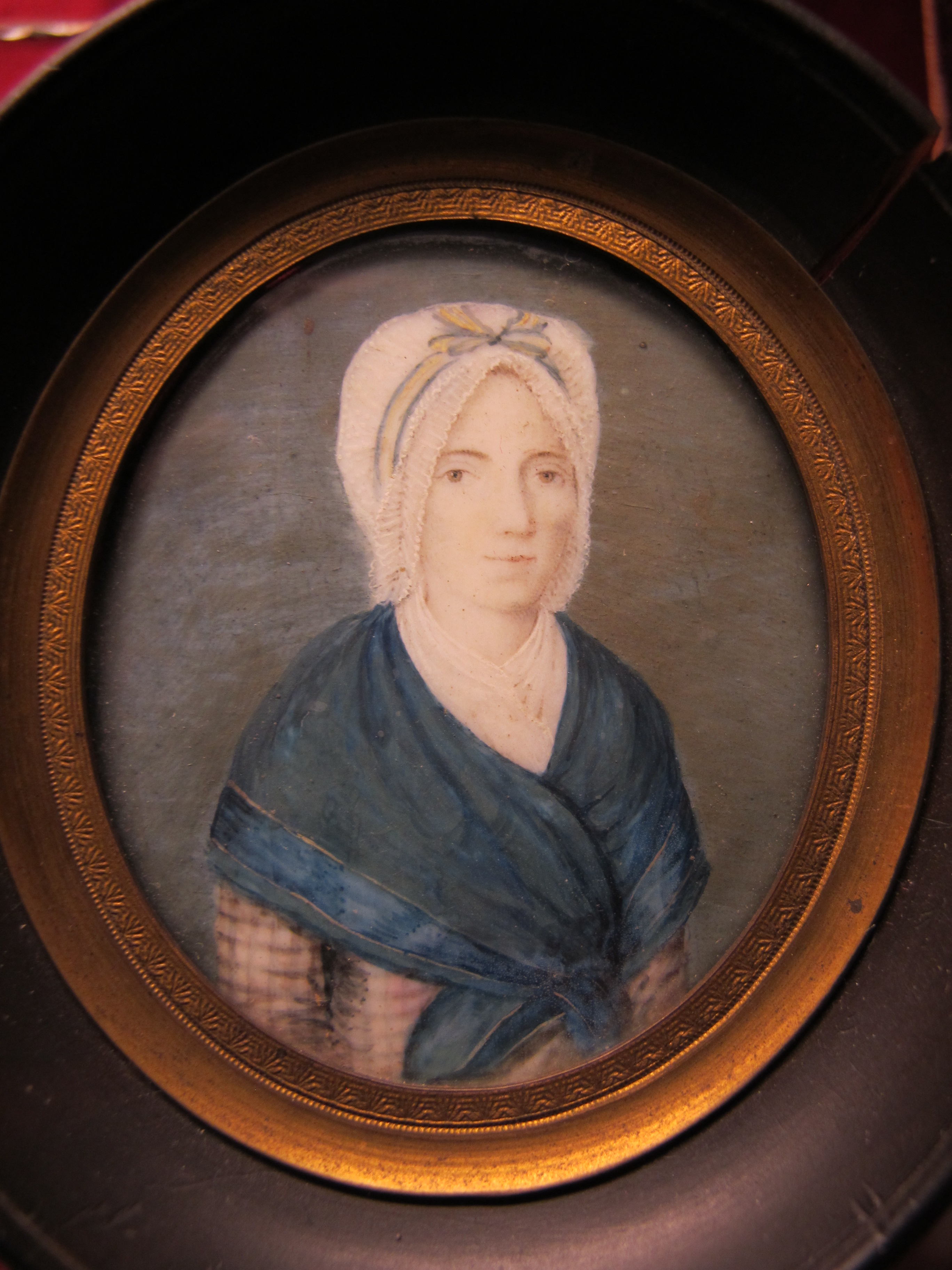 Portrait conservé au musée Charles-de-Bruyères de Remiremont